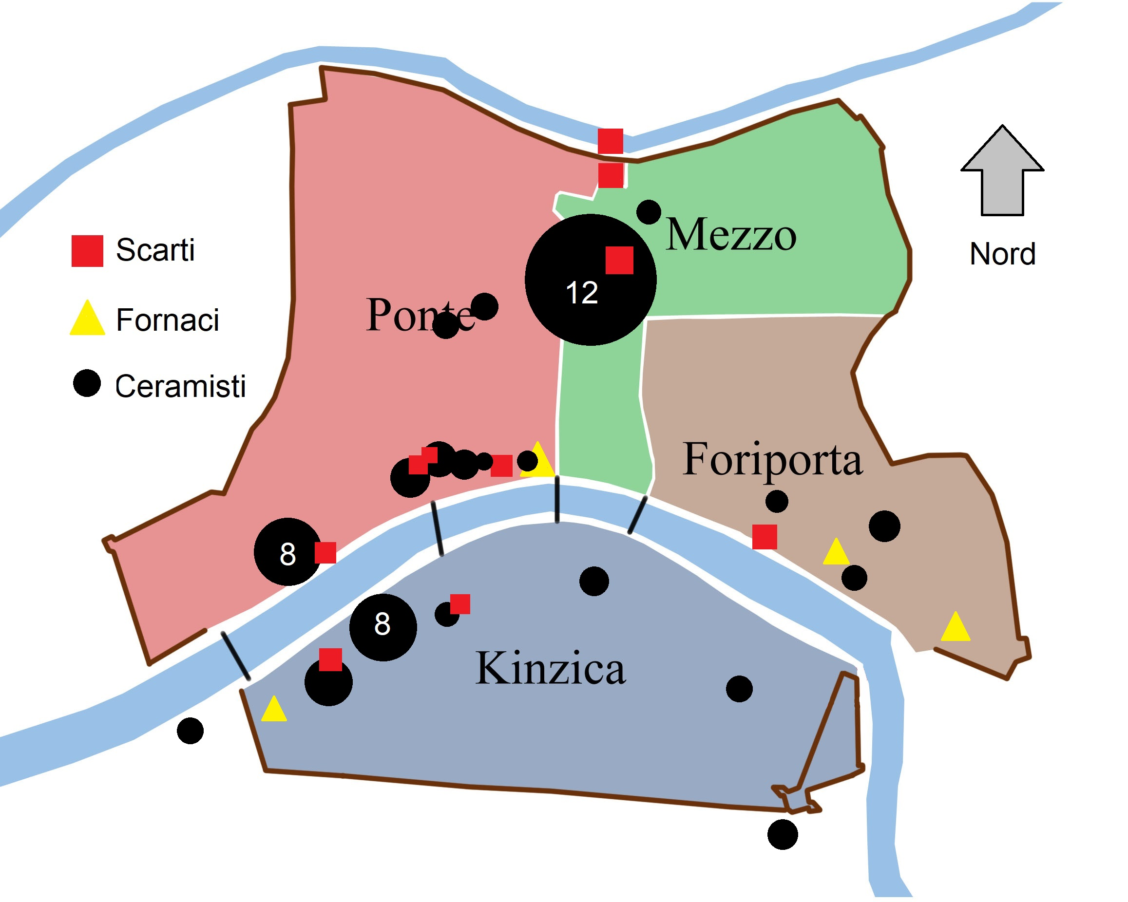 Mappa che mostra approssimativamente la presenza dei ceramisti e delle fornaci durante il XVI secolo. Sono anche indicati i punti cittadini dove sono state rinvenute discariche di scarti di fornace o d'uso (La grandezza dei cerchi che indicano i ceramisti varia. In base a questa i cerchi indicano da 1 a 7 ceramisti, sopra i 7 viene esplicitato il numero).